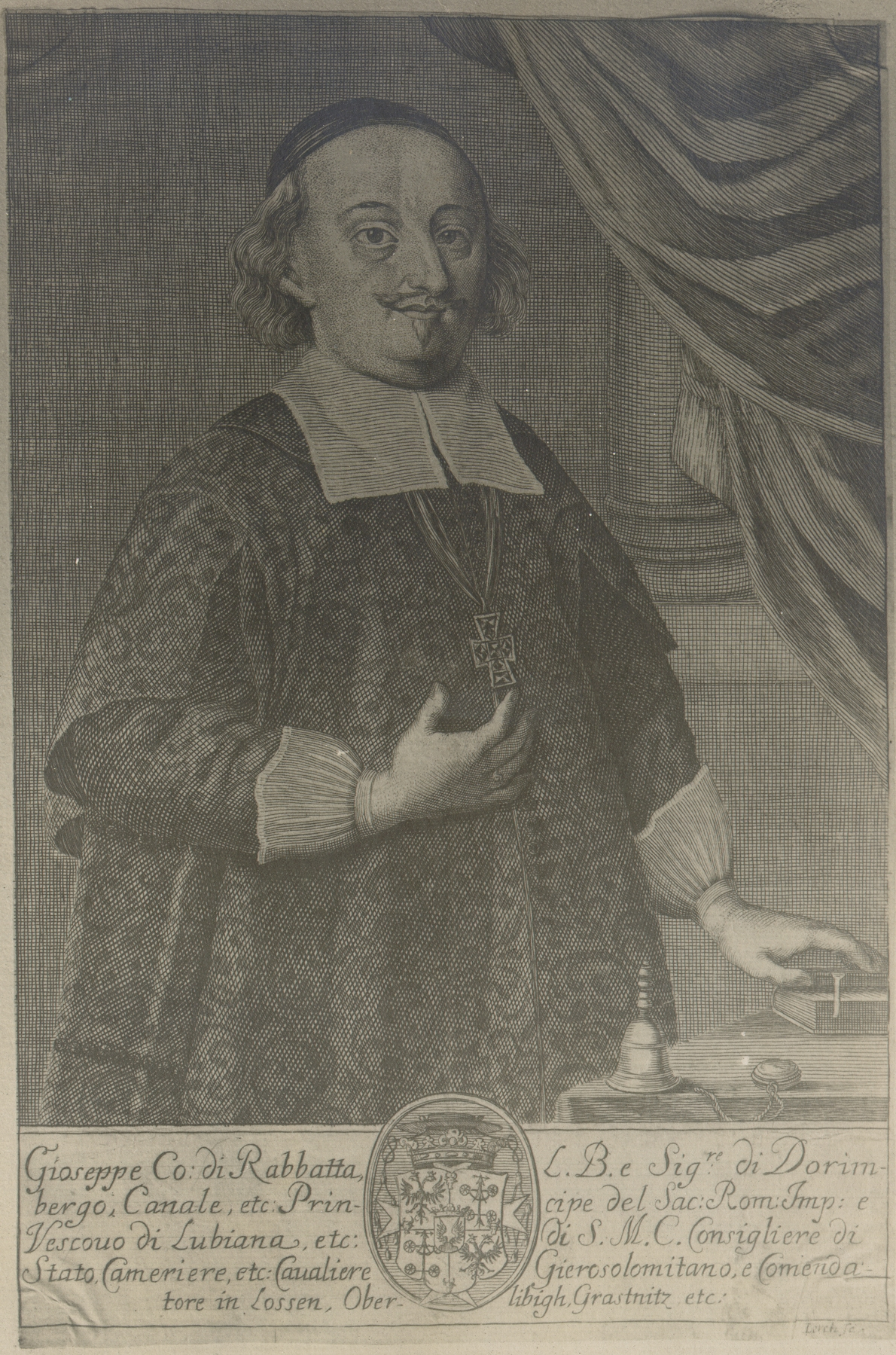 Jožef Rabatta (1620-1683), Slovene bishop.